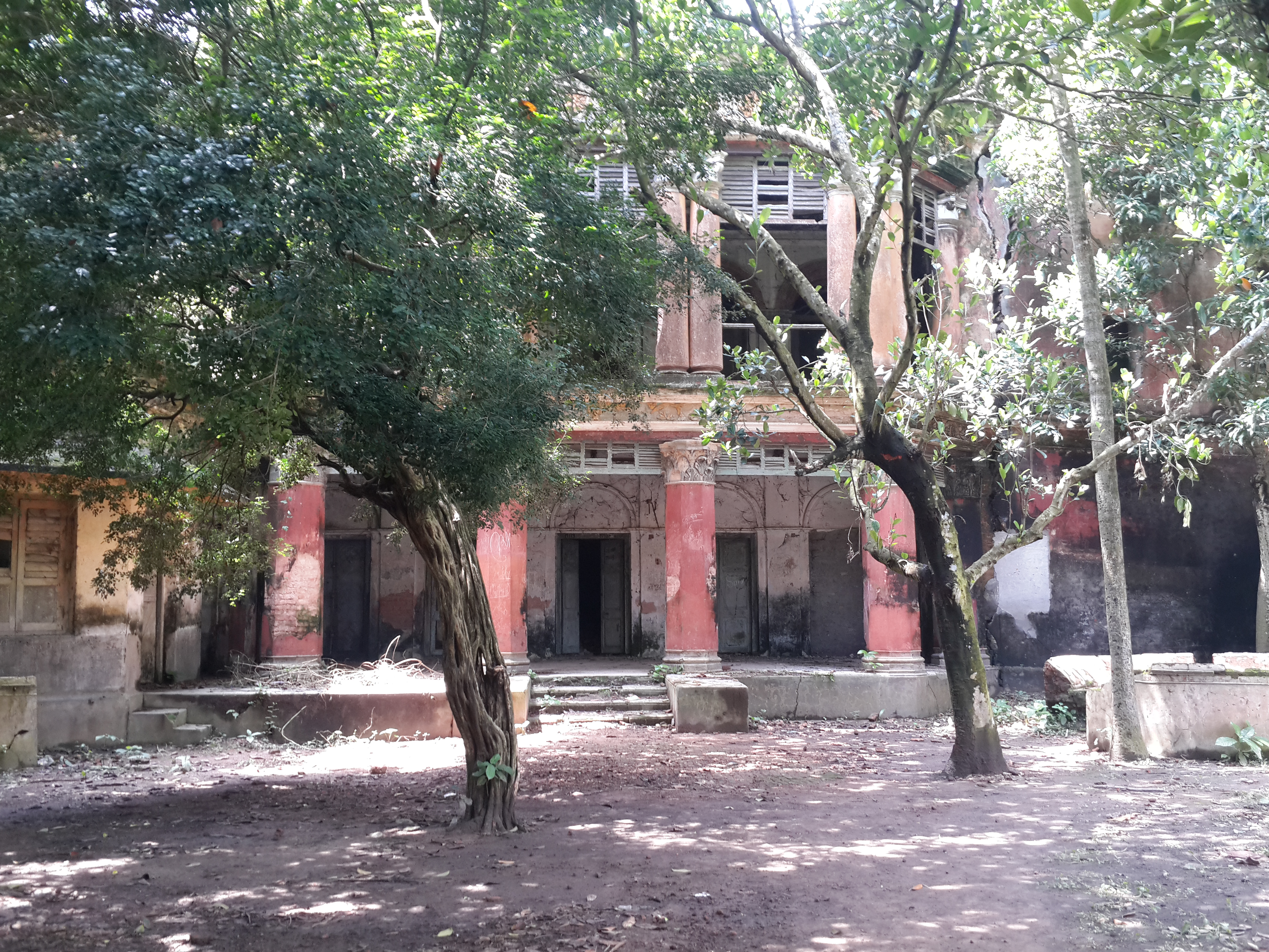 বলিহার জমিদার বাড়ি